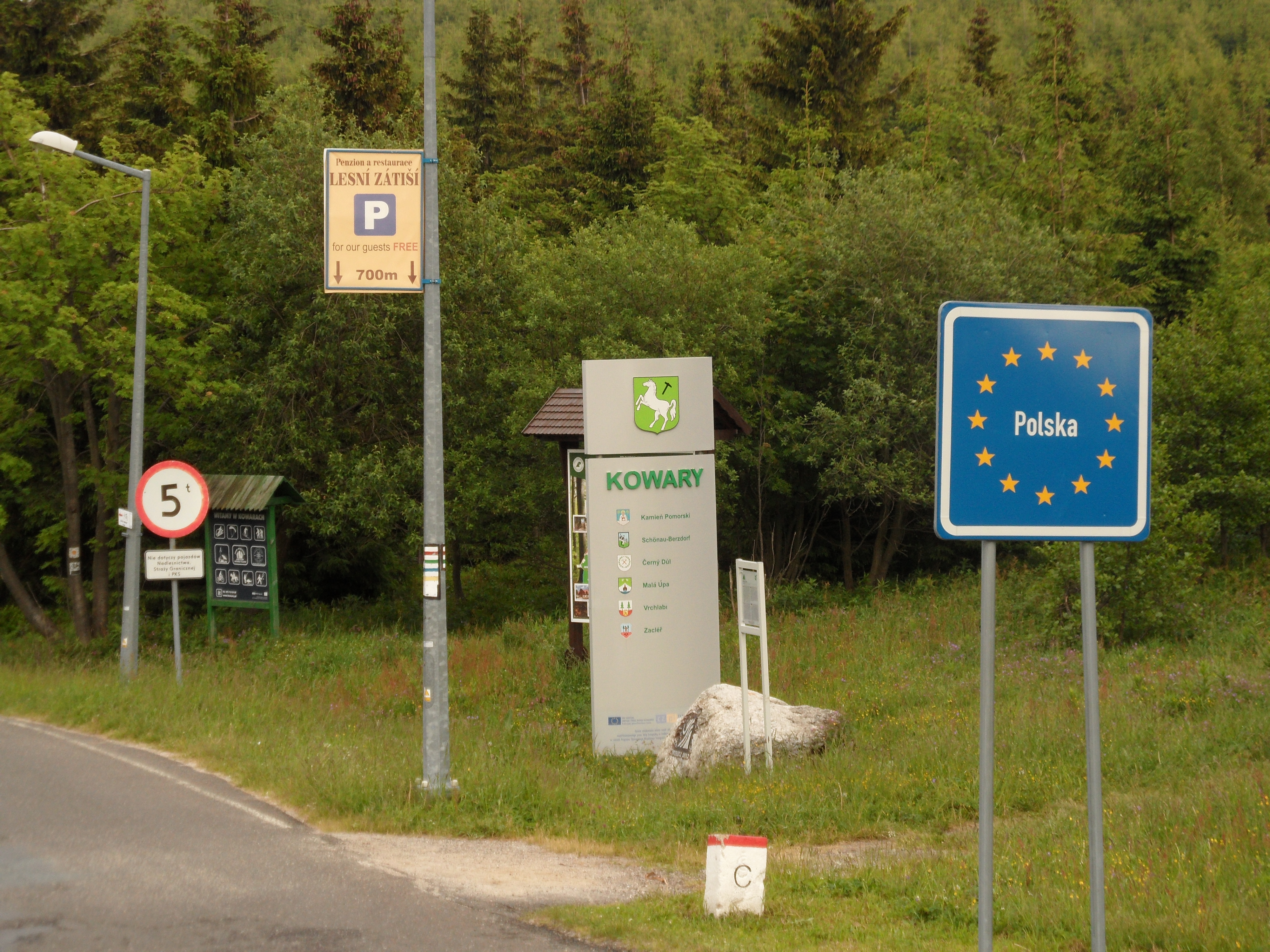 Przełęcz Okraj - Grenzbaudenpass